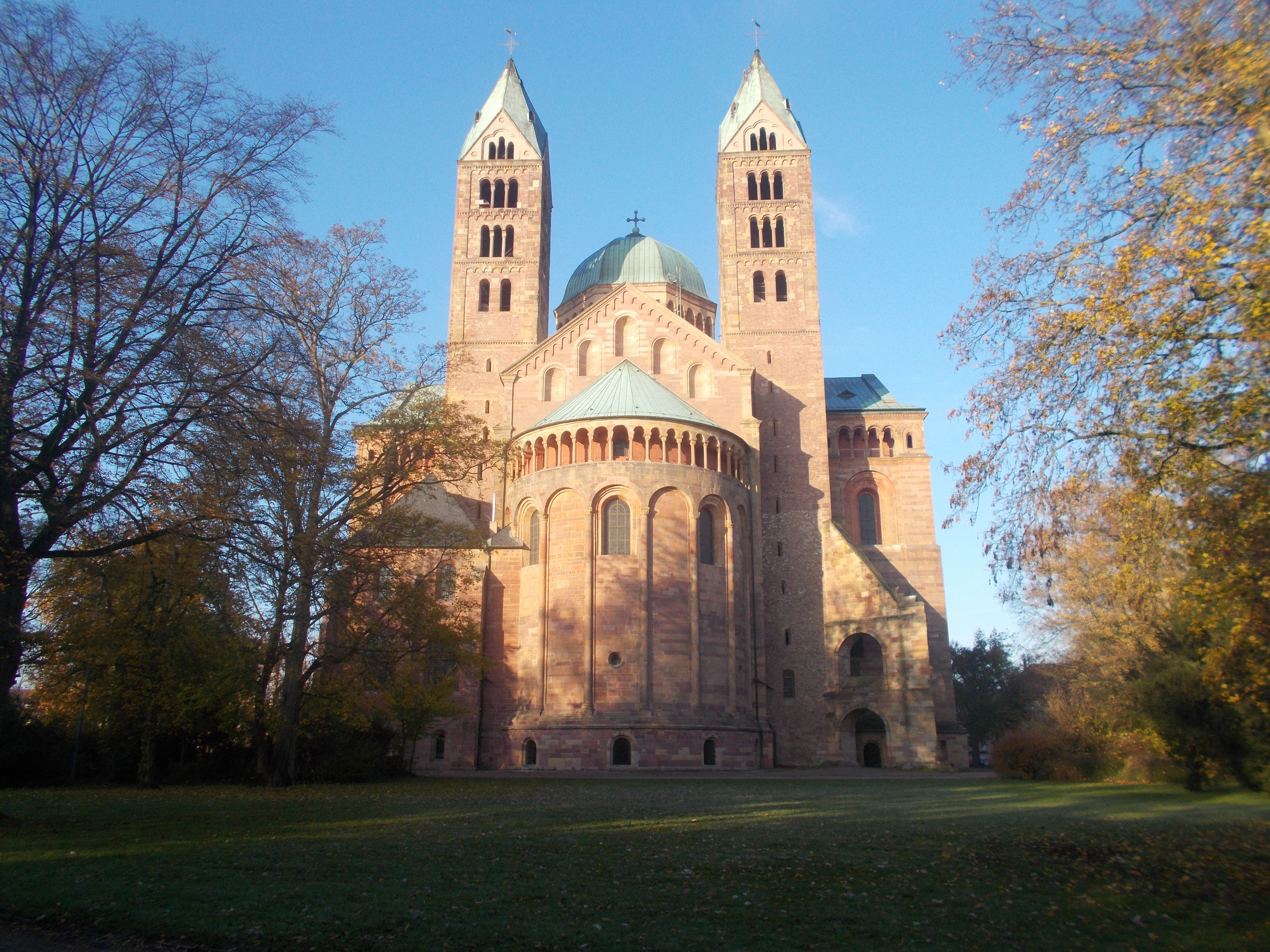 mächtige, dreischiffige Gewölbebasilika über lateinischem Kreuz, mit Vorhalle, Ost- und Westturmgruppe, um 1027 von Konrad II. gestiftet, Kryptenweihe 1041, Hochaltarweihe 1046, 1061 Schlussweihe (Speyer I); Umgestaltung und Hochschiffseinwölbung unter Heinrich IV. nach 1080; St. Afra-Kapelle und Doppelkapelle St. Emmeran und St. Katharina unter Heinrich IV.; Speyer II: Umbau und Erweiterungen bis zum frühen 12. Jahrhundert; Sakristeianbau 1409–11; nach Stadtbrand 1689 Wiederherstellung des Ostbaus, 1755 ff. Abtragung der oberen Teile des Westbaus mit Türmen, 1772–78 Wiederaufbau der 1689 zerstörten Langhausjoche, neuer Westbau unter Einbeziehung der romanischen Vorhalle, Architekt Franz Ignaz Michael Neumann; 1794 Verwüstung durch französische Revolutionstruppen, 1818–22 Wiederherstellung und Neuweihe, 1846-53 Nazarener-Ausmalung durch Johann von Schraudolph und Joseph Schwarzmann, 1854–58 neuromanischer Westbau, Architekt Heinrich Hübsch, 1900–06 Kaisergruft, 1957–61 umfassende Restaurierung